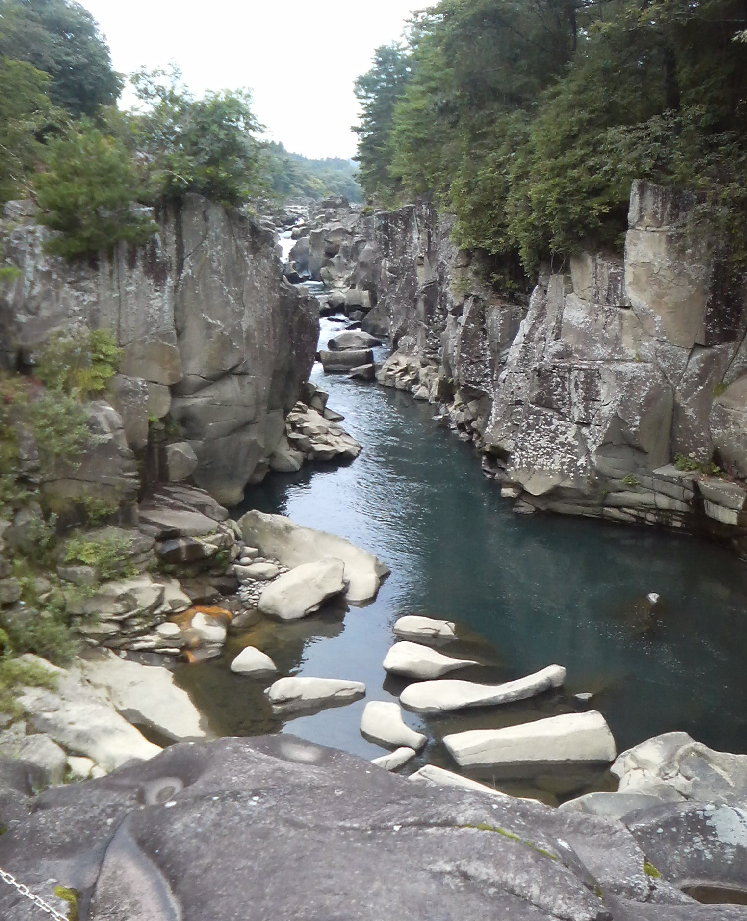 厳美渓 (ゲンビケイ)